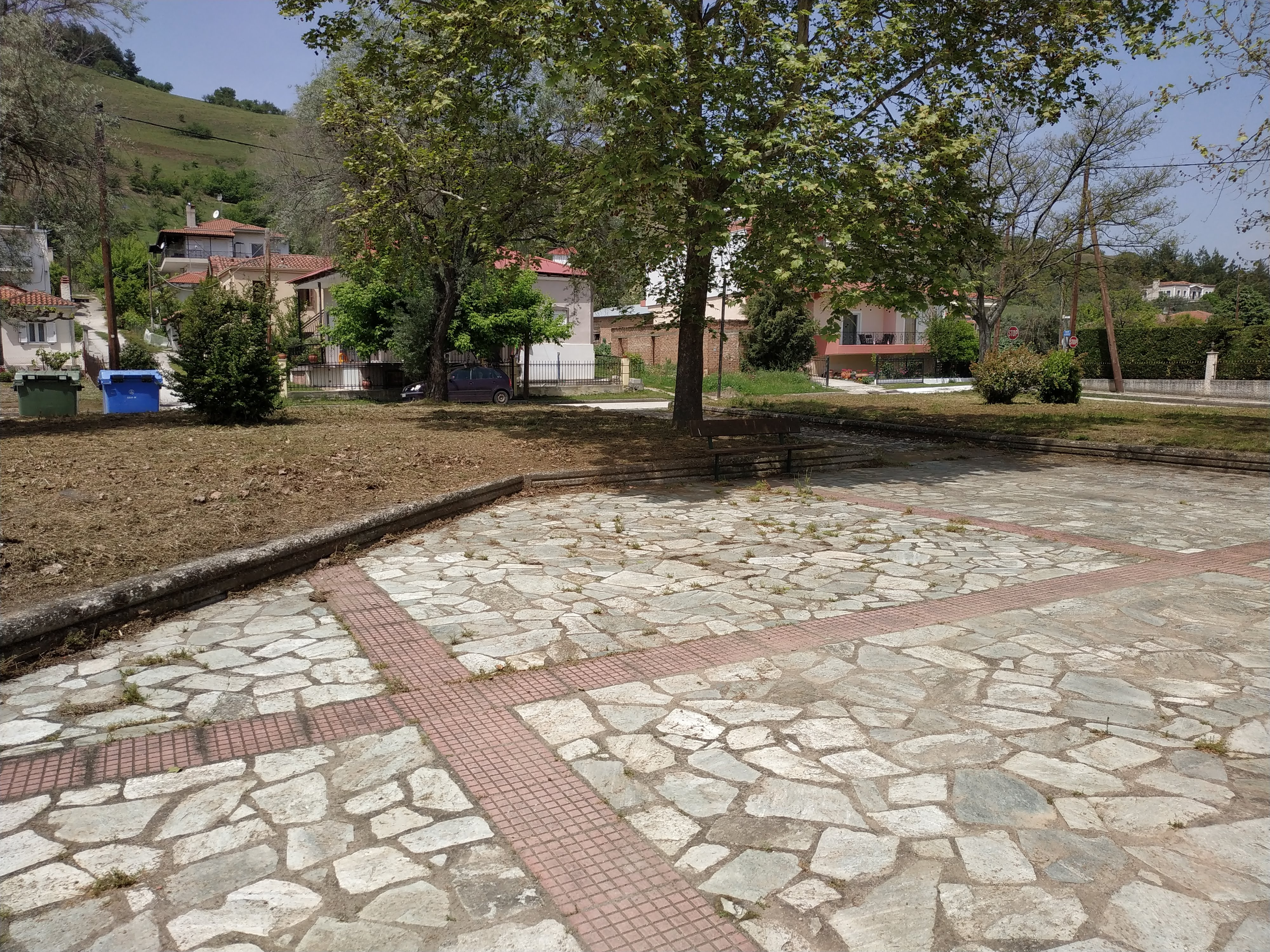 Πλατεία Λογγάκι 2